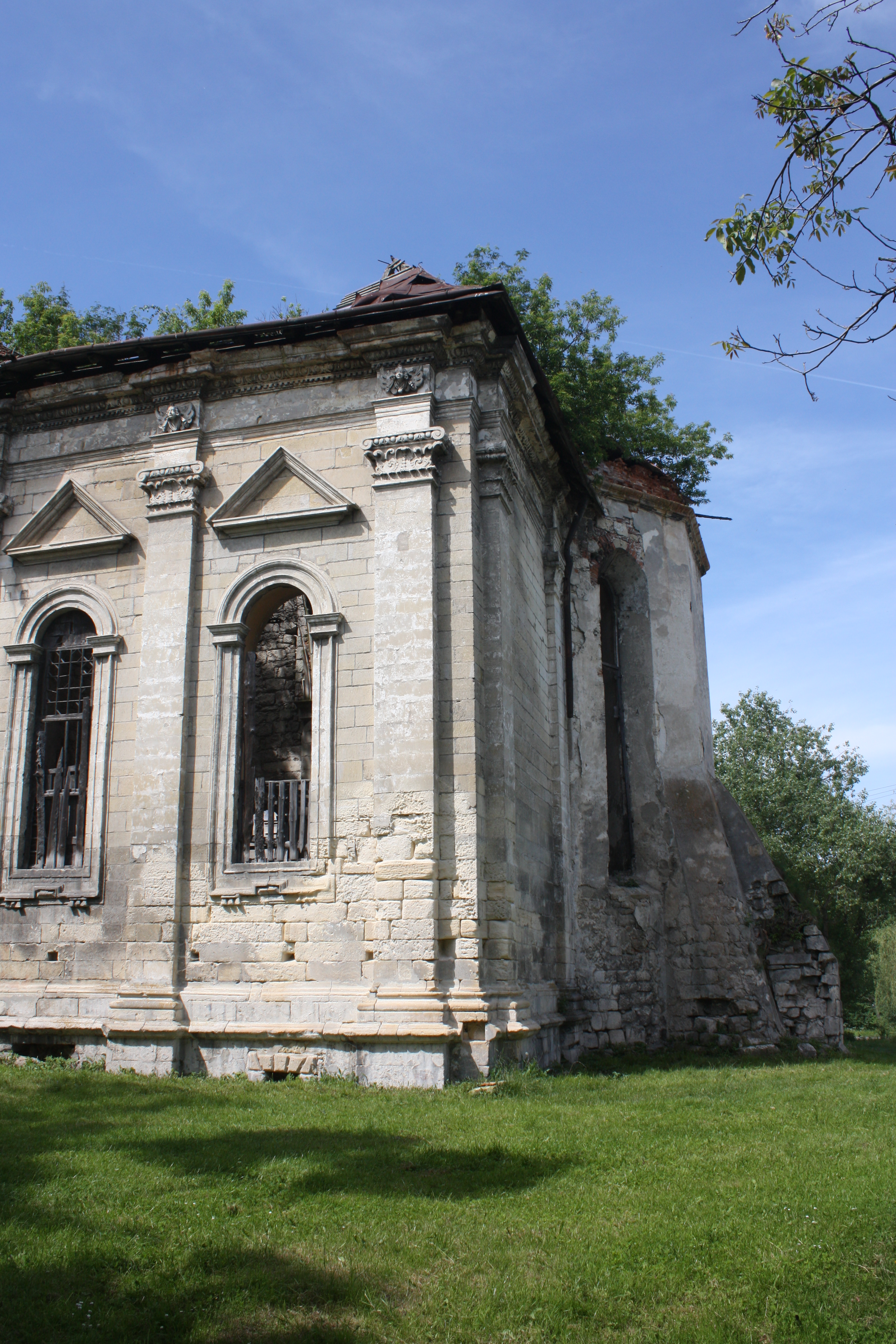 Kaplica Potockich w kościele Trójcy Świętej w Podhajcach stan 2010